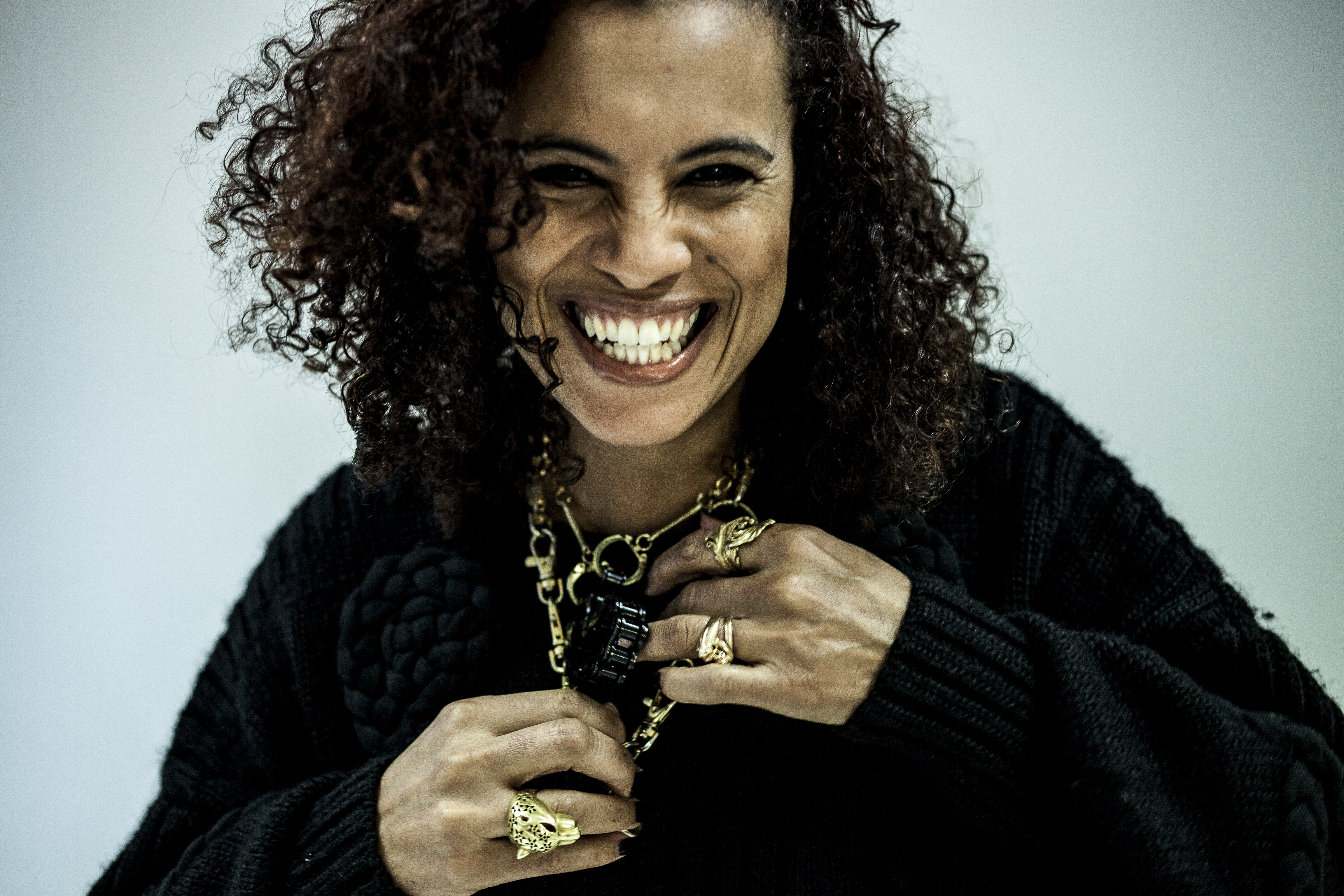 Artisten Neneh Cherry.